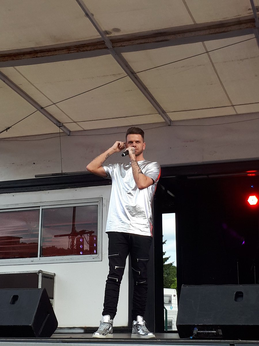 Keen'v en concert